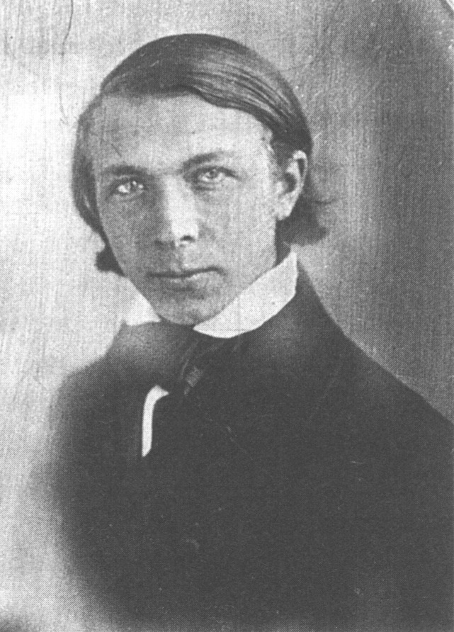 Kittel,_Ferdinand_(1832-1903) German priest and indologist